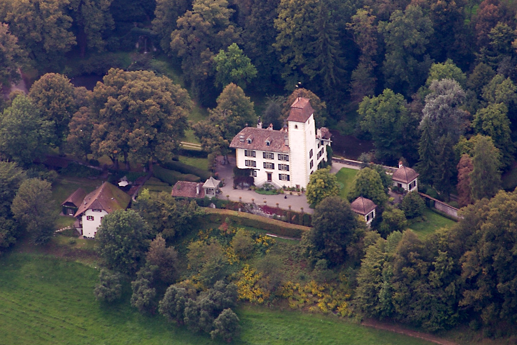 Schloss Rümligen, Schweiz